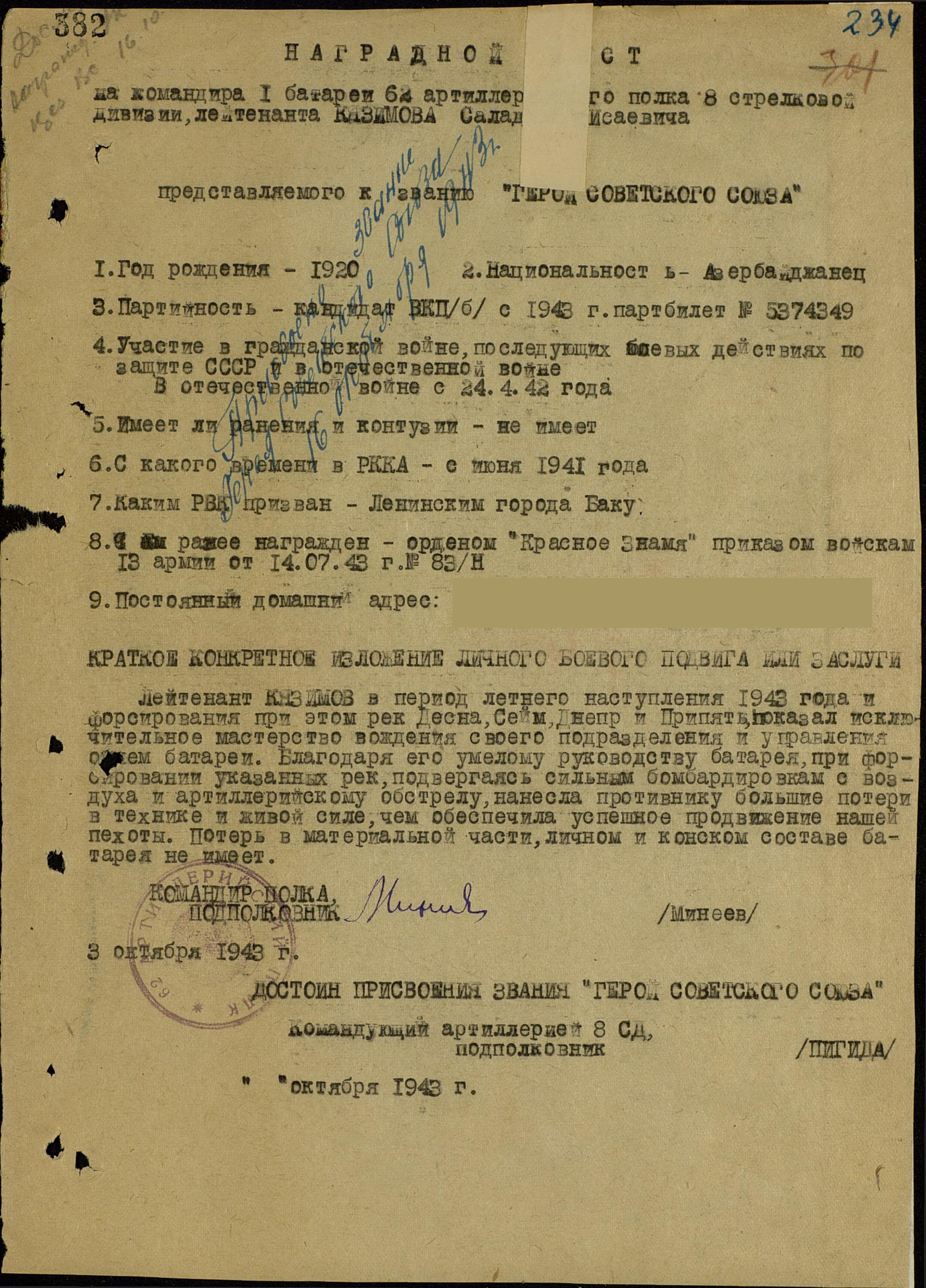 Наградной лист Кязимова о присуждении звания Герой Советского Союза